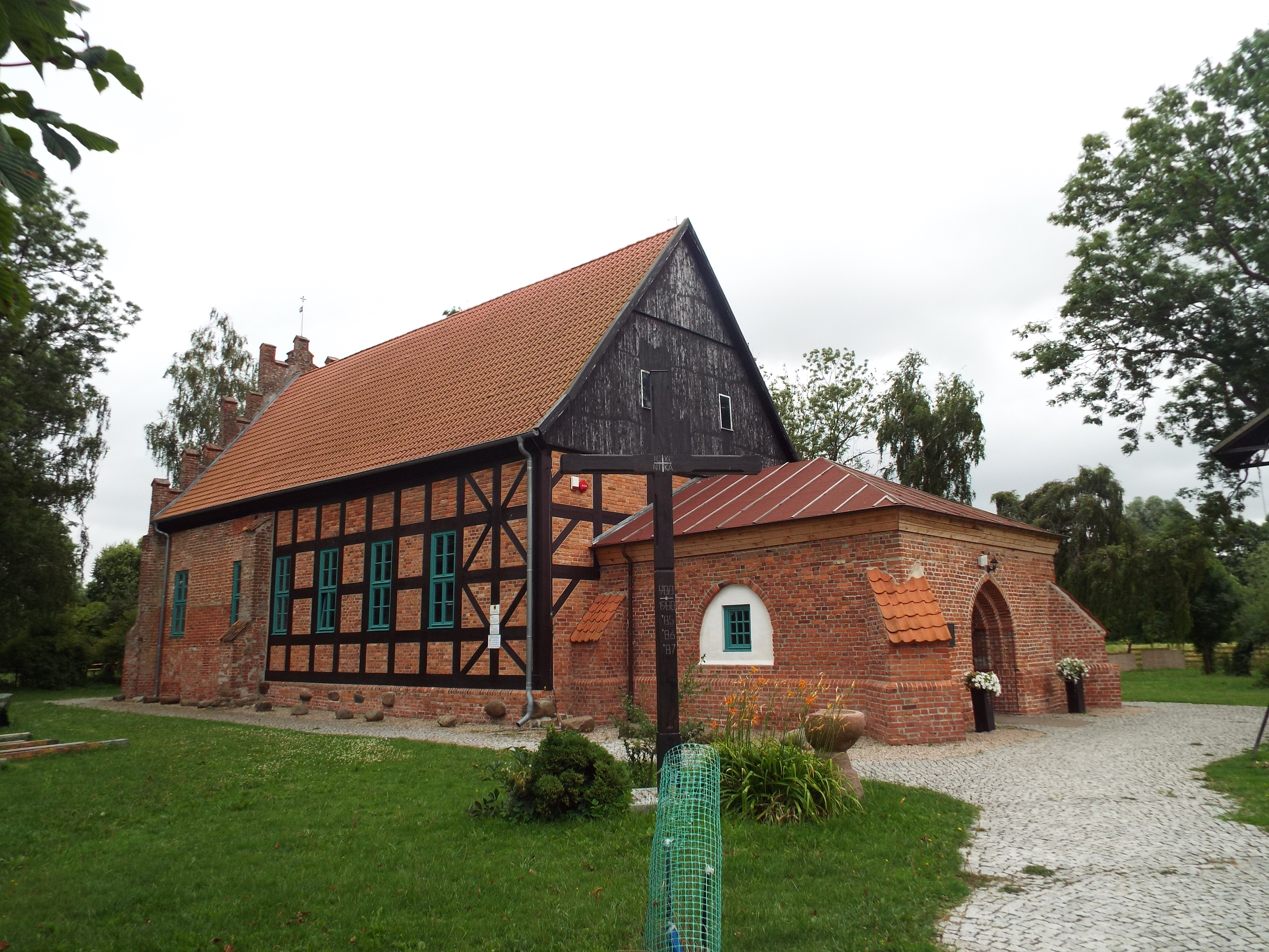 Cyganek - pierwotnie kościół rzymskokatolicki, obecnie greckokatolicka cerkiew parafialna, 1352, 1637-1674